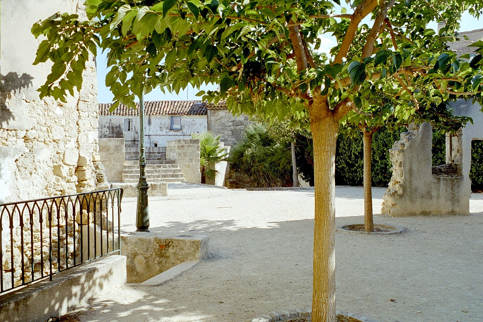 Place et sommet d'une bastide dans le Lot (Midi-Pyrénées, France).